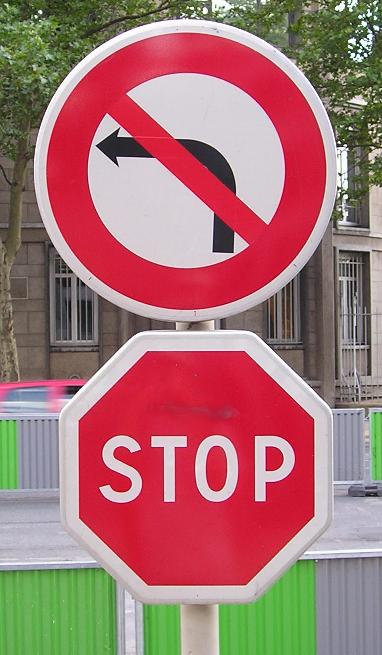 Description:Panneaux de circulation Source: Photographie à Paris par Utilisateur:Sebjarod Licence